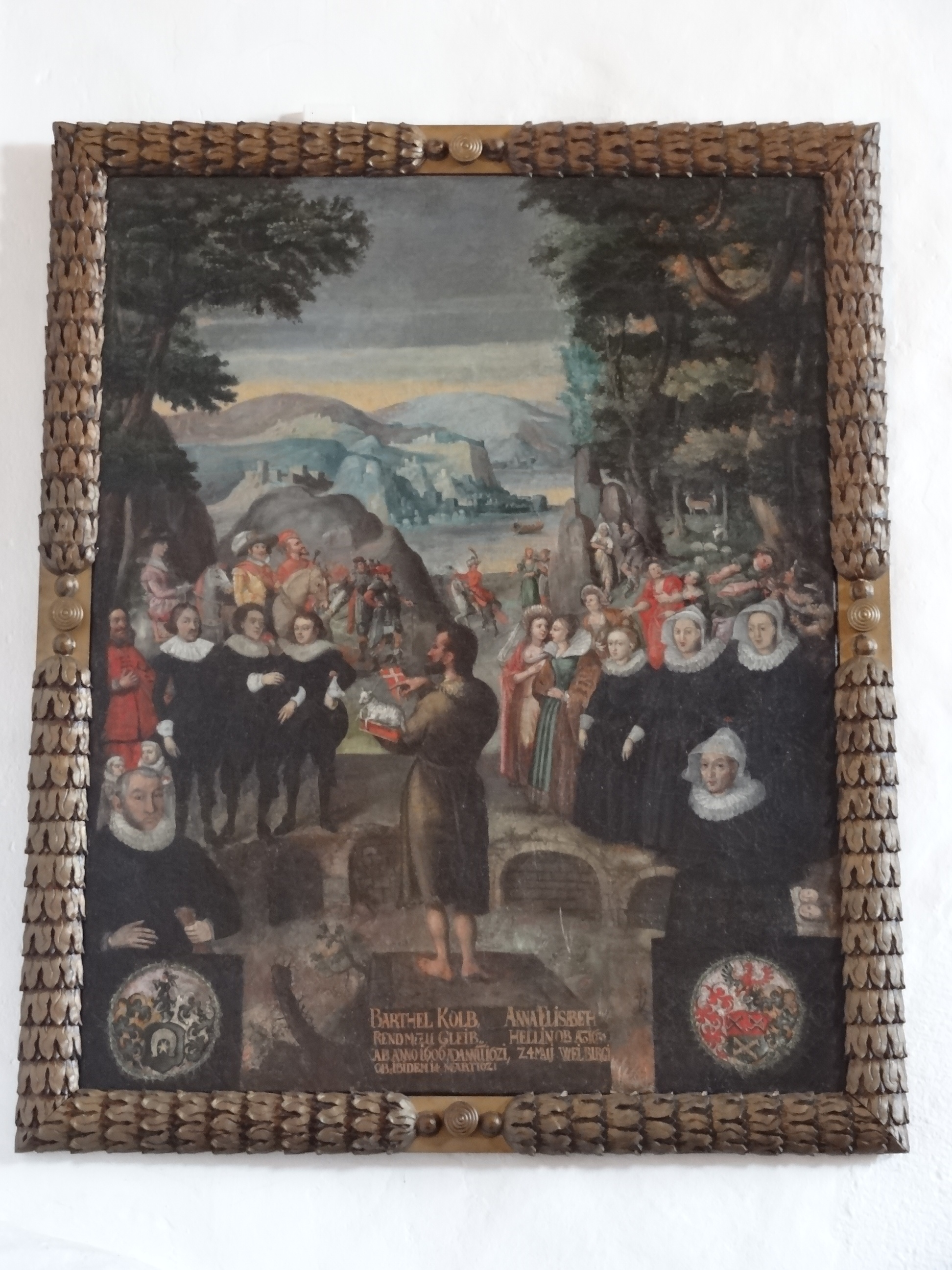 Margarethenkirche (Krofdorf) Das Epitaph, 2010 restauriert von Diplomrestauratorin Sabine Kuypers aus Biebertal-Fellingshausen, gilt Barthel Kolb, von 1606 bis 1621 Rentmeister zu Gleiberg, gestorben zu Gleiberg am 14. März 1621, und seiner Frau Anna Elisabeth geb. (Braun genannt) Hell, gestorben am 24. Mai 1634 zu Weilburg. Außerdem dargestellt sind 5 Söhne und 5 Töchter des Ehepaares: 2 kleine Söhne über dem Kopf des Vaters, die wohl früh verstarben; darüber 3 erwachsene Söhne in schwarzer Kleidung, von denen die rechten beiden durch Kreuzchen als verstorben gekennzeichnet sind; rechts neben der Mutter 2 Töchter als liegende Wickelkinder, von denen nur die Köpfe sichtbar sind, das untere mit Kreuzchen versehen; über der Mutter 3 erwachsene Töchter in schwarzer Kleidung, davon die linke ohne Haube (also noch unverheiratet) und ohne Kreuzchen, die beiden rechts daneben mit Haube und Kreuzchen. Vor den Figuren der Eheleute die jeweiligen Wappen Kolb (Ehemann) und (Braun gen.) Hell (Ehefrau). Seit Dezember 2010 wieder in der Margarethenkirche, wo sie weit über 200 Jahre ihren angestammten Platz hatten, bevor Adrian Freiherr van der Hoop die beiden Epitaphe kaufte, sie 1880 restaurieren ließ und ihnen auf dem Hofgut Schmitte einen neuen Platz zuwies. Manfred Schmidt, Wettenberg-Krofdorf, fand mit seinem Sohn Andreas 2006 zufällig auf der Schmitte die beiden Epitaphe in der Vorhalle des Wohnhauses, dem sogenannten Haus am Bach der Dr. Dorothea Freifrau van der Hoop in Rodheim, wieder. Der dann folgende Kauf der Epitaphe gilt als Projekt der Denkmalstiftung für die evangelischen Kirchen in Krofdorf und Gleiberg. [1]